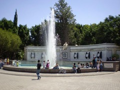 es una foto de la alameda zaragoza de torreon